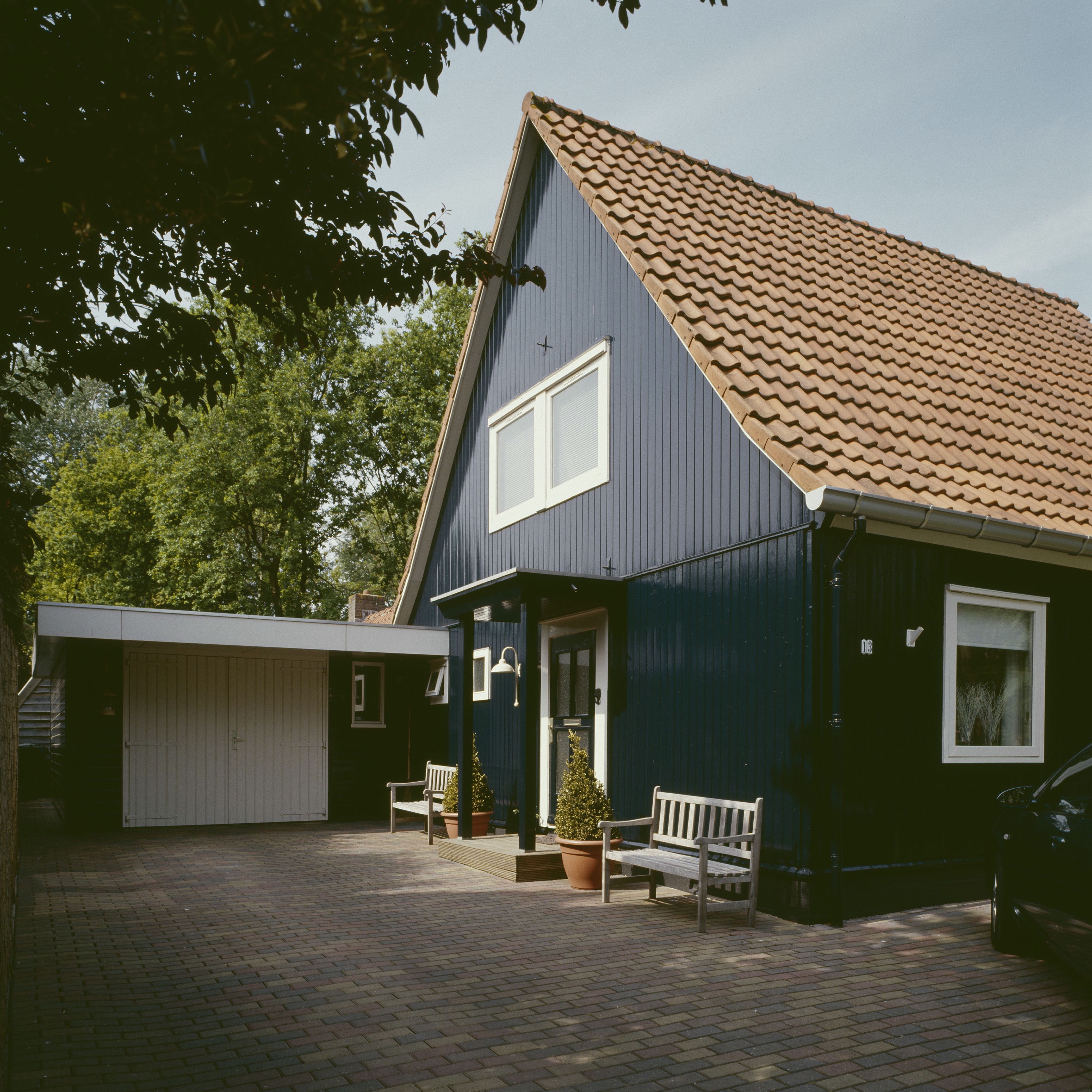 Houten Noodwoningen Emmeloord: Overzicht voorgevel met ingang en garage (opmerking: Deze als Oostenrijkse woningen bekende huizen zijn in 1948-1949 gebouwd)